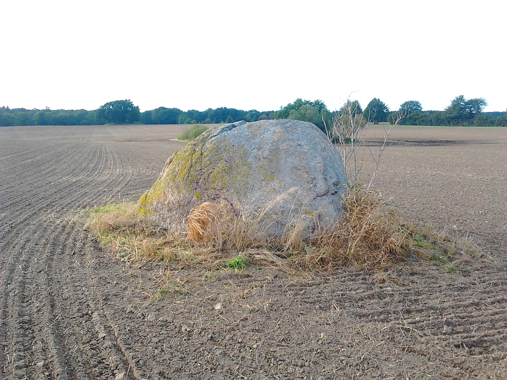 Opferstein bei Pustow, Gemeinde Sassen-Trantow, Landkreis Demmin